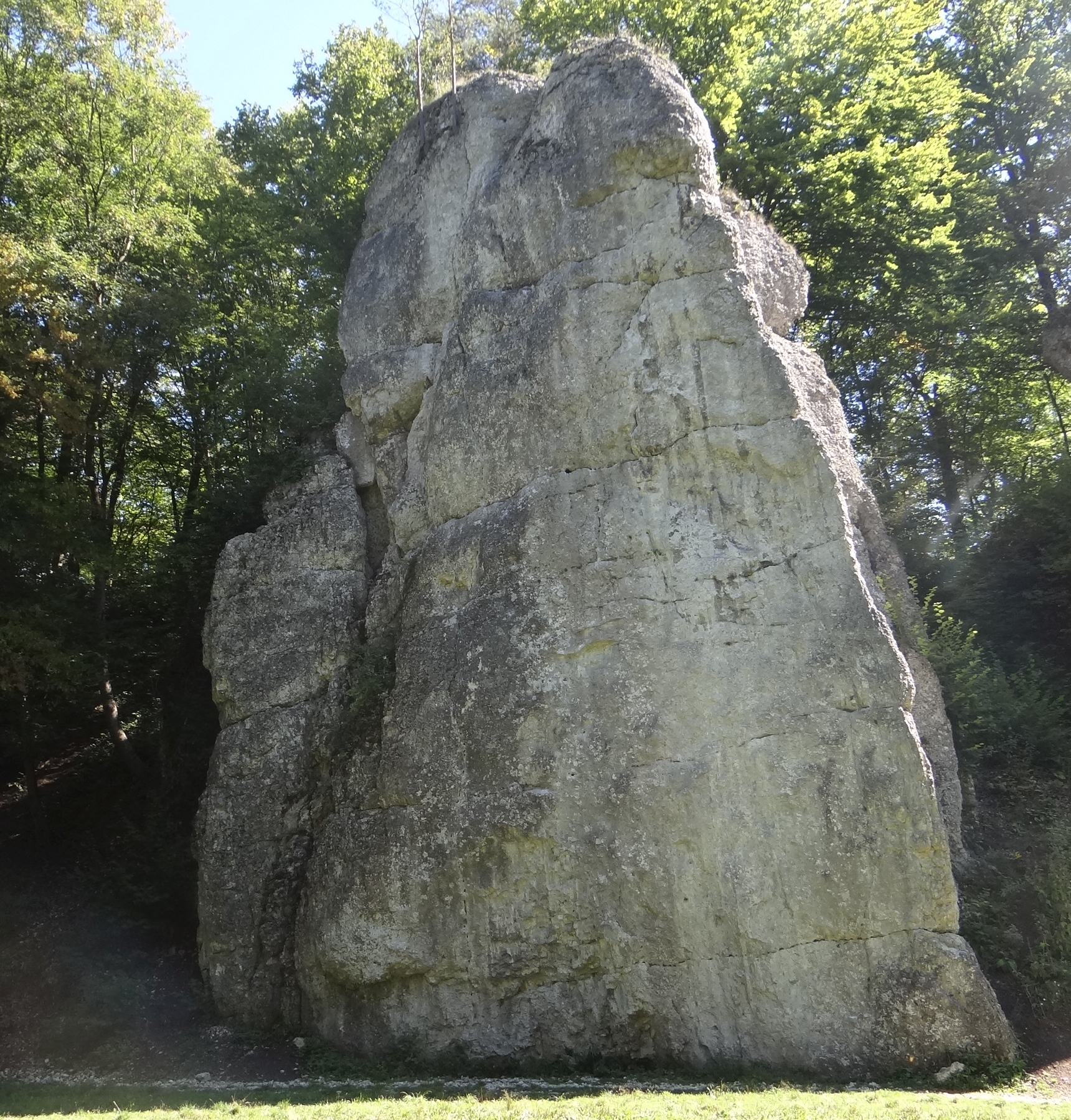 Skała Lipczyńska w Dolinie Będkowskiej